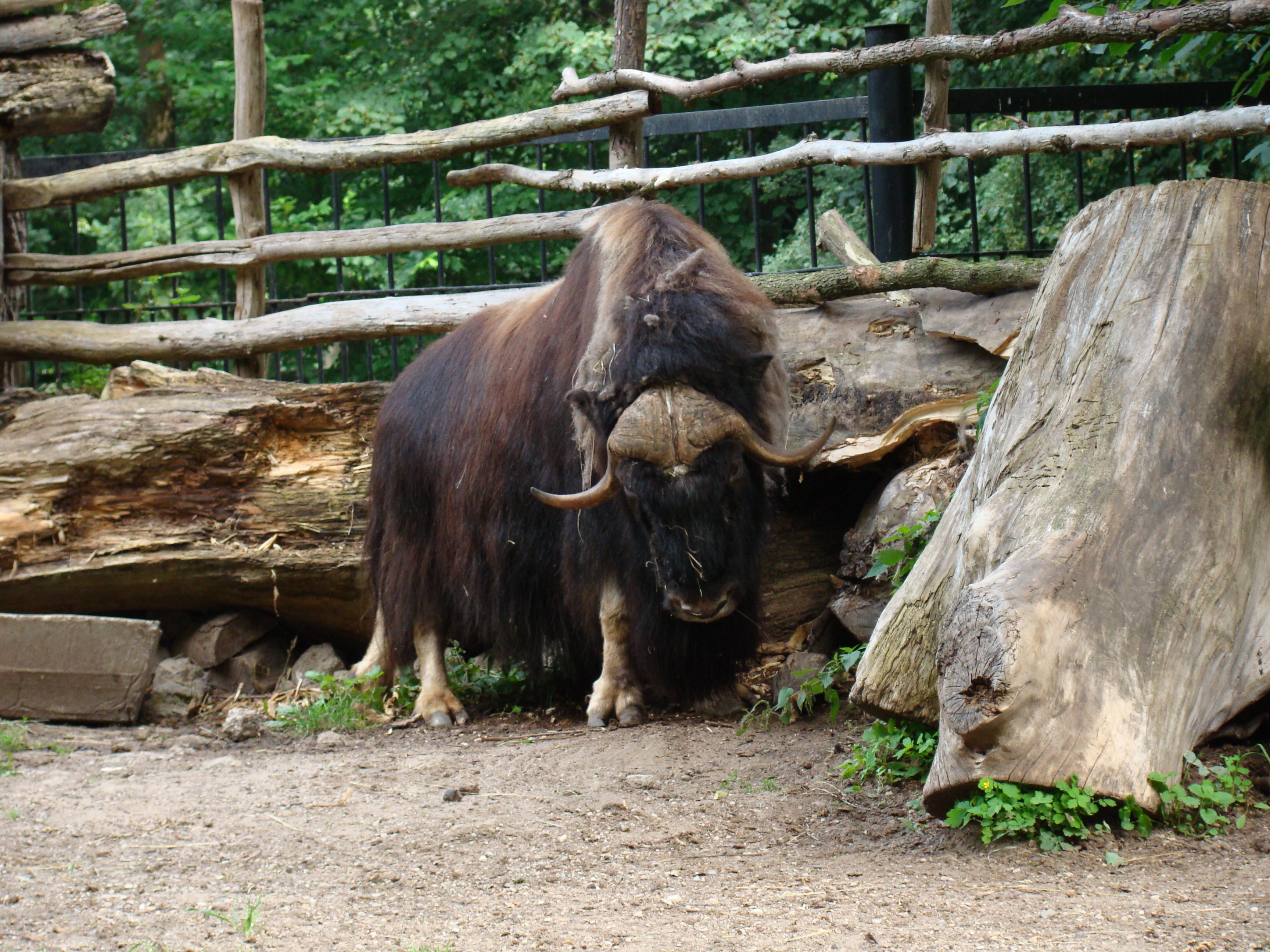 Avijautis Kauno zoologijos sode.